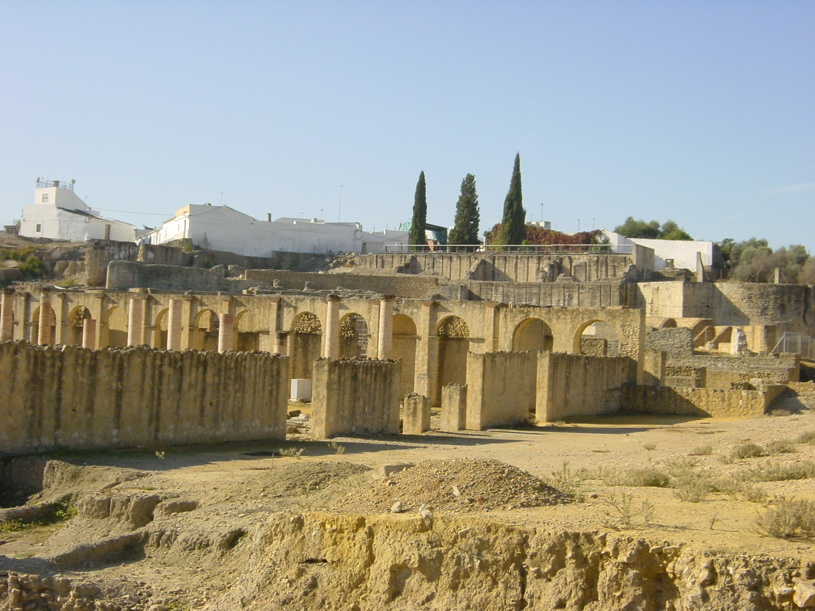 Castillo de Las Guardas, Sevilla (España)